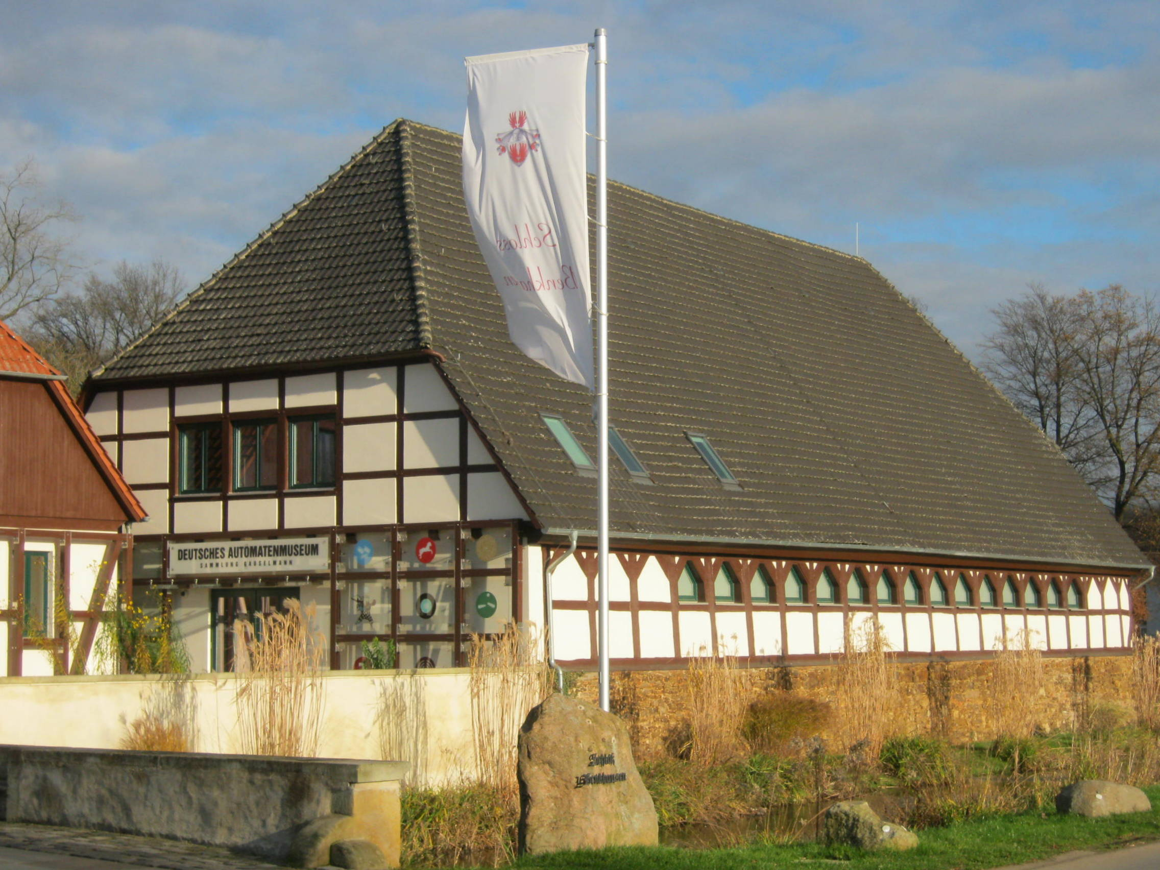 Deutsches Automatenmuseum in der einstigen Scheune des Schlosses Benkhausen, Espelkamp. This image shows a heritage building in Germany, located in the North Rhine-Westphalian city Espelkamp (no. 24).